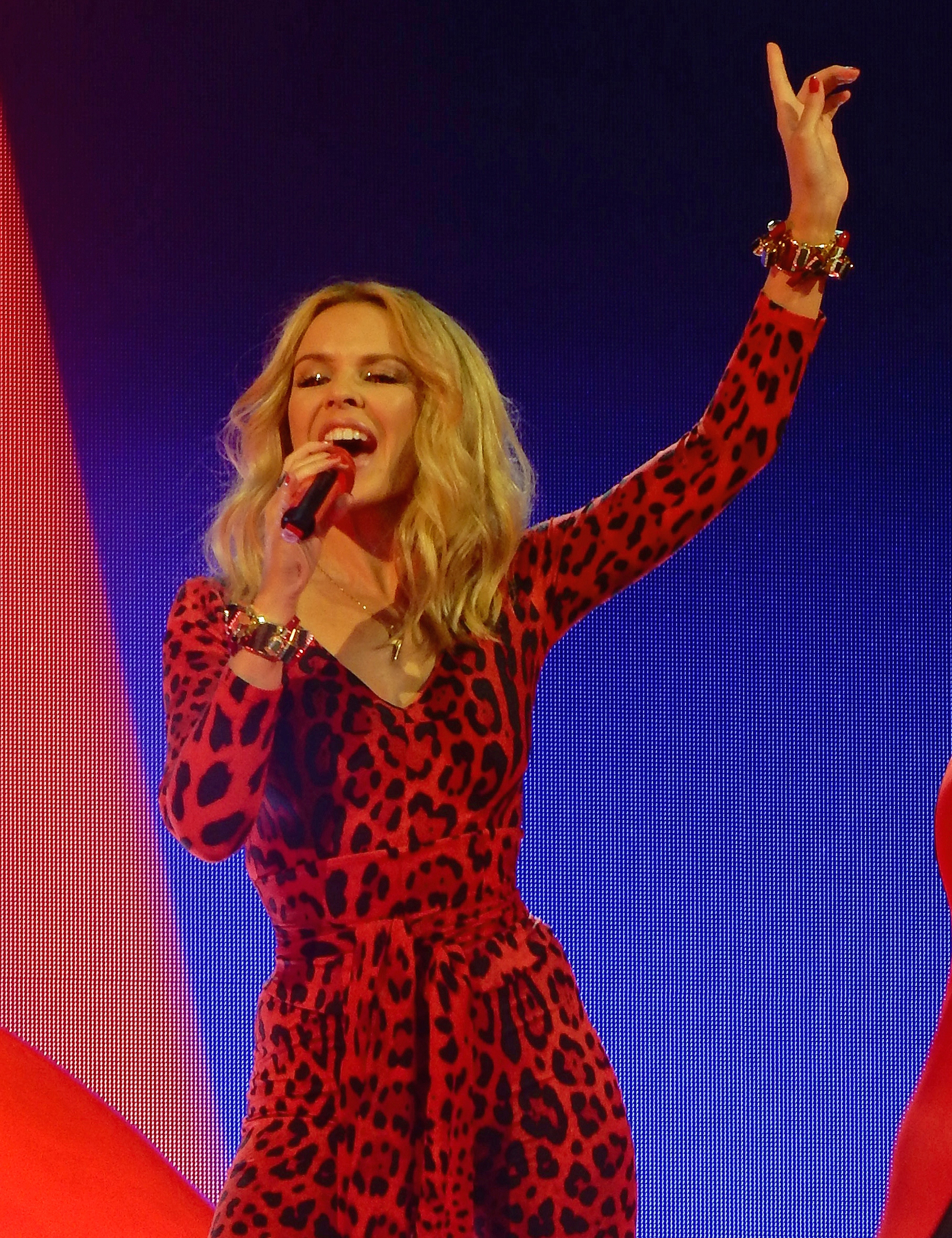 Kylie Minogue - Summer 2015 - Haydock Park - 20.06.15. - 031